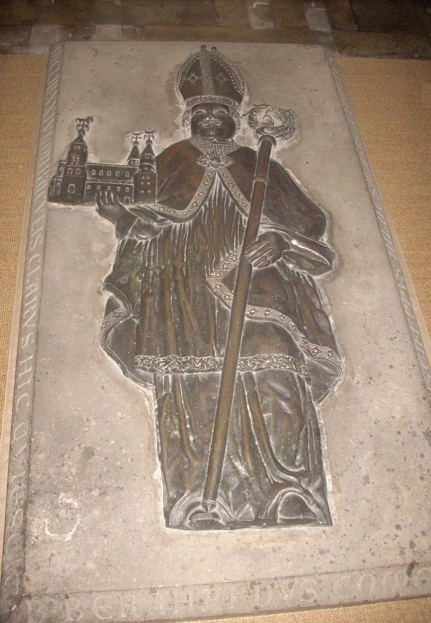 Hildesheim, Basilika St. Godehard, Chor, Grabplatte des Bischofs Bernhard, Stifter von Kirche und Kloster (gest. 1154), Sandstein mit Bronzerelief (1745)